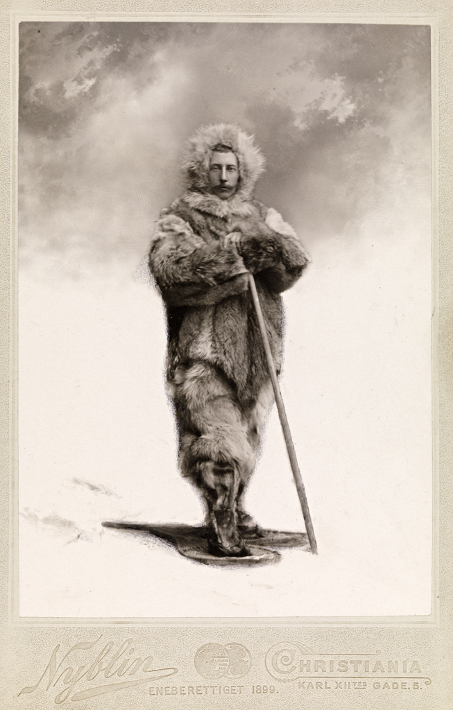 Руаль Амундсен